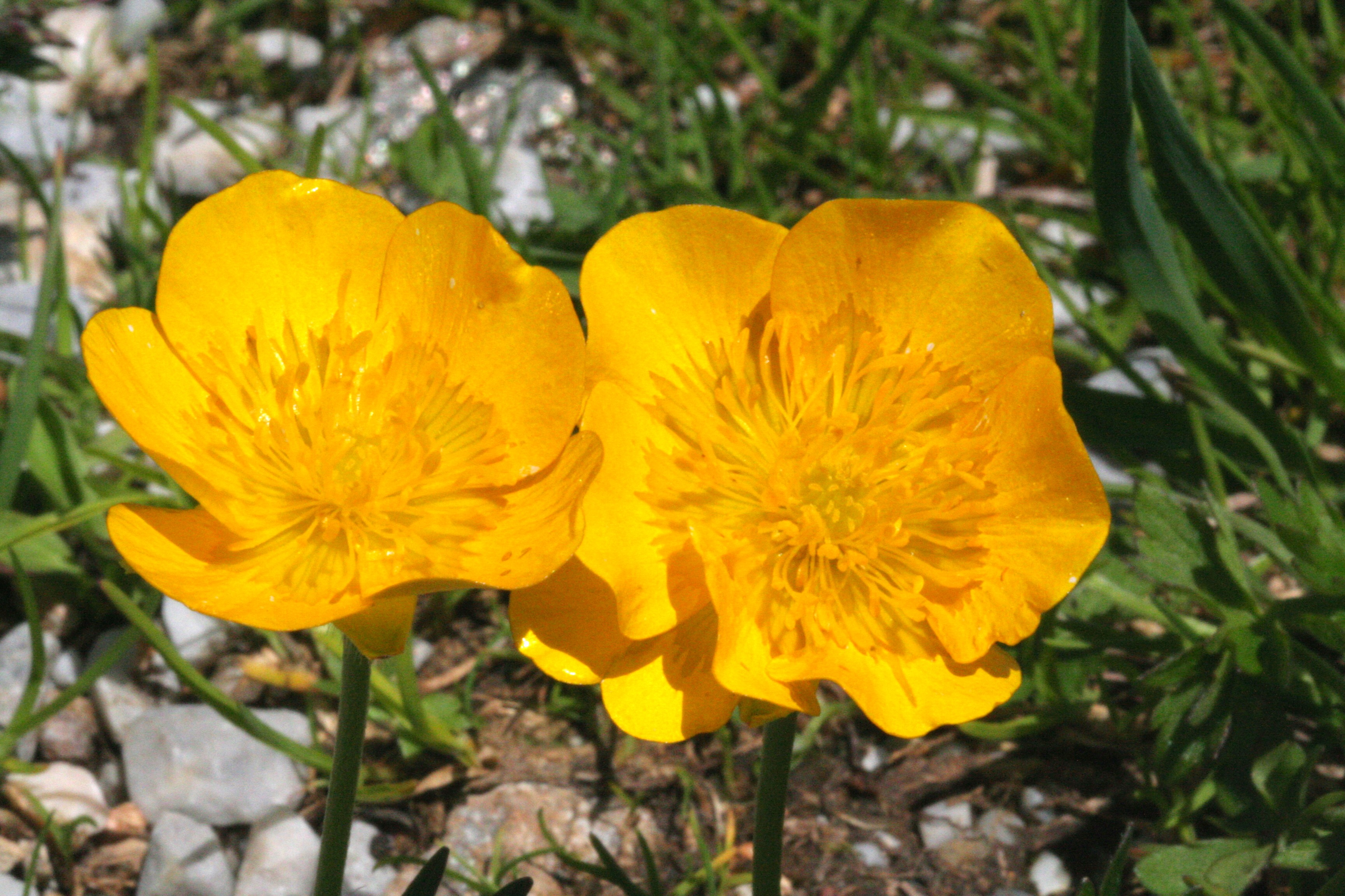 Ranuncolo montano - Località: Sorgenti del Piave, Sappada (BL), 1820 m s.l.m.